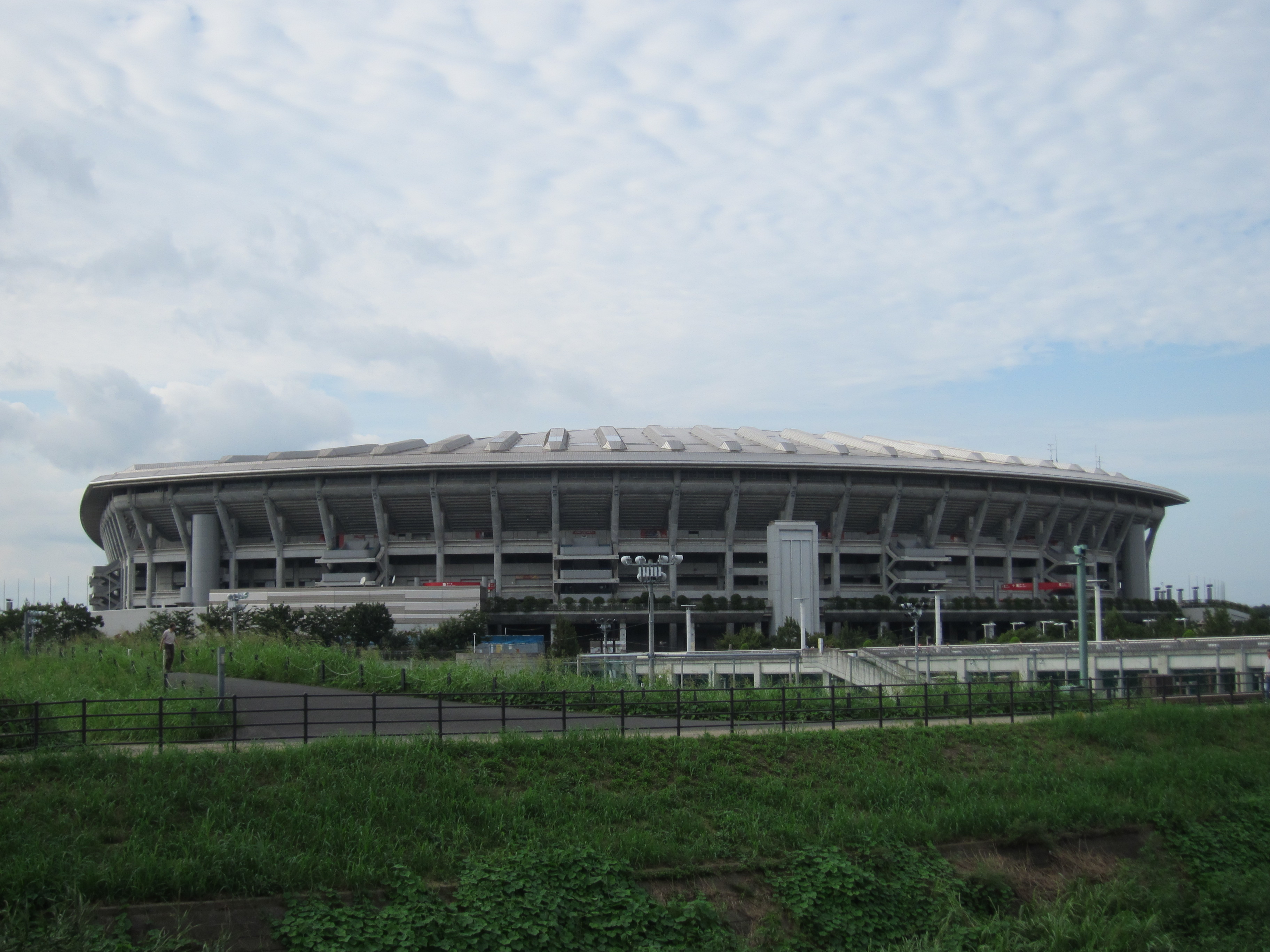 横浜国際総合競技場（日産スタジアム）